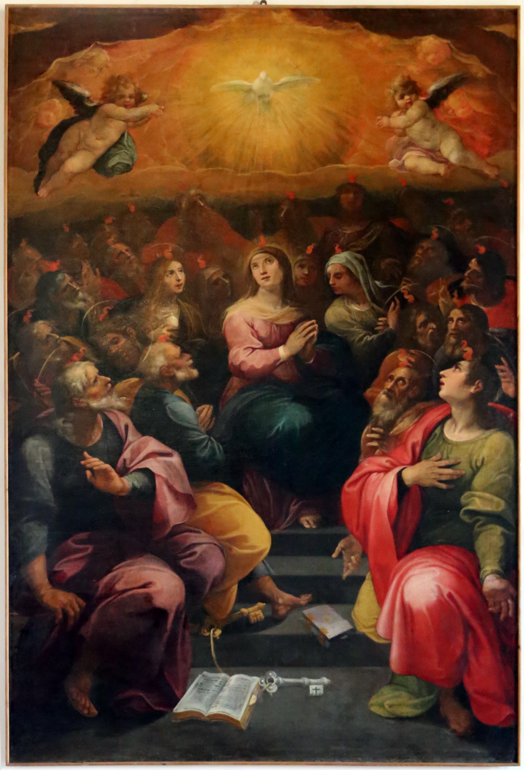 Museo del Colle del Duomo (Viterbo) - Palazzo dei Papi This is a photo of a monument which is part of cultural heritage of Italy.